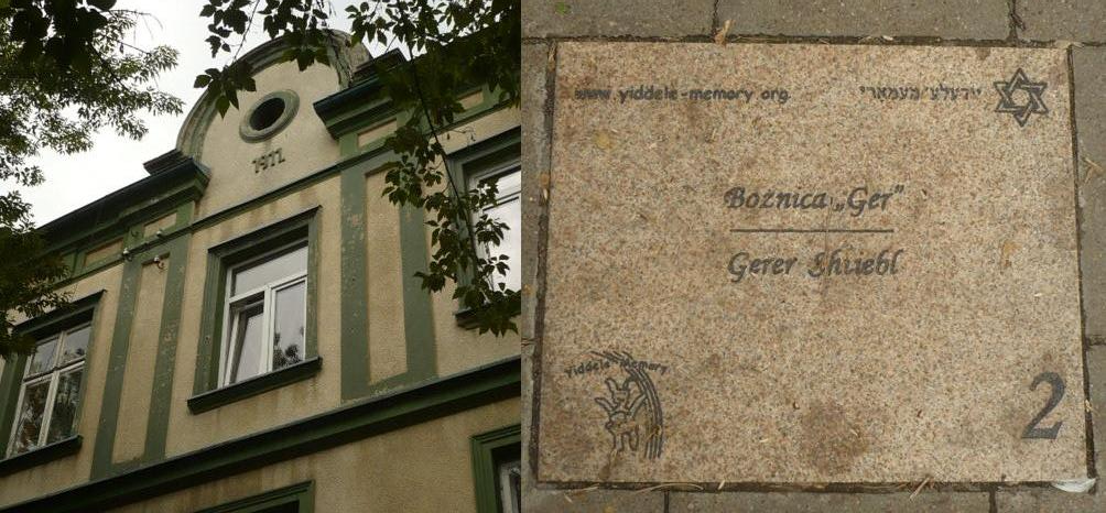 Radomsko. Otwarte Muzeum Żydowskie 2